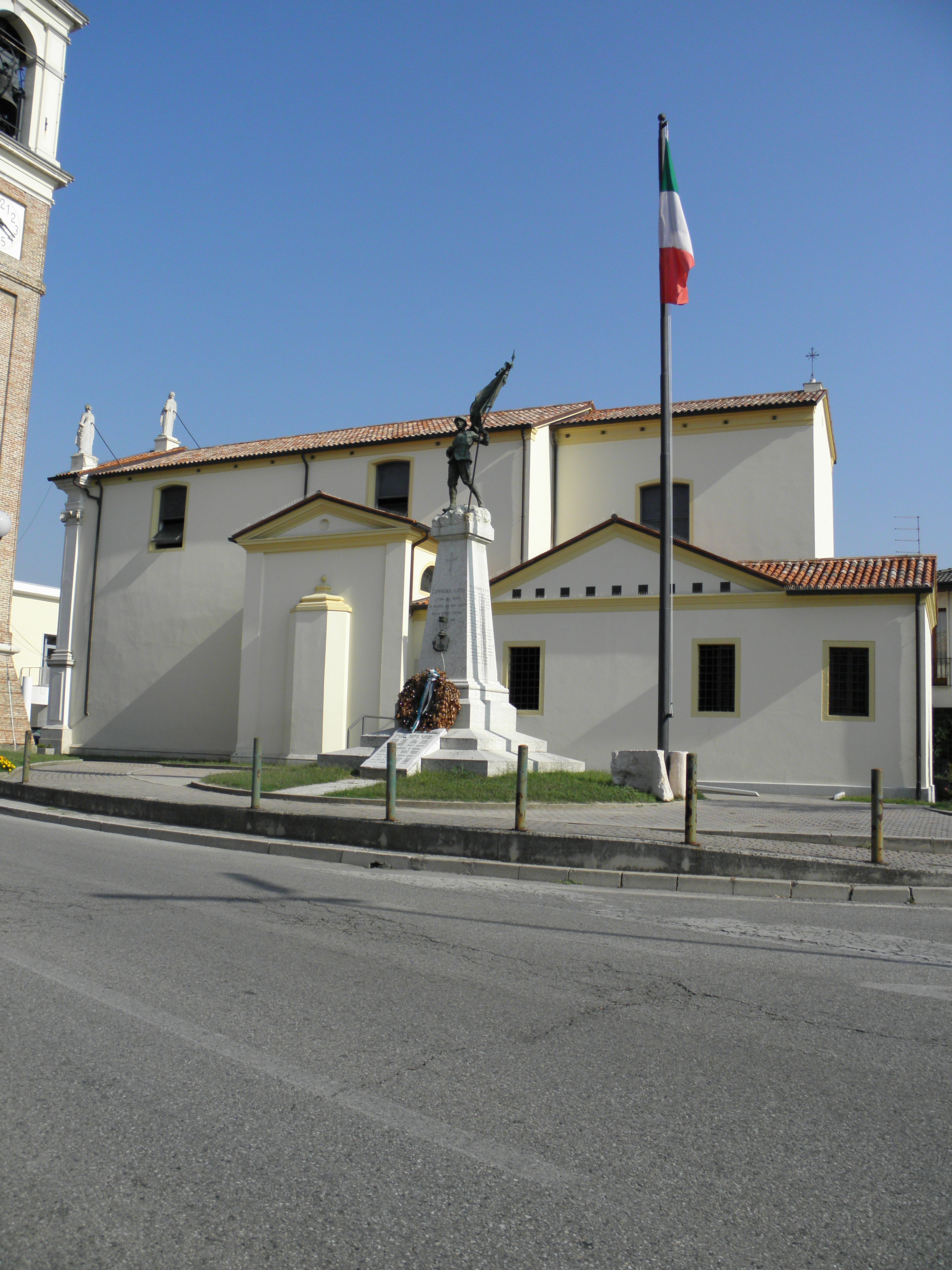 Campagna Lupia: il monumento ai concittadini caduti durante le guerre, in secondo piano la chiesa parrocchiale di San Pietro.